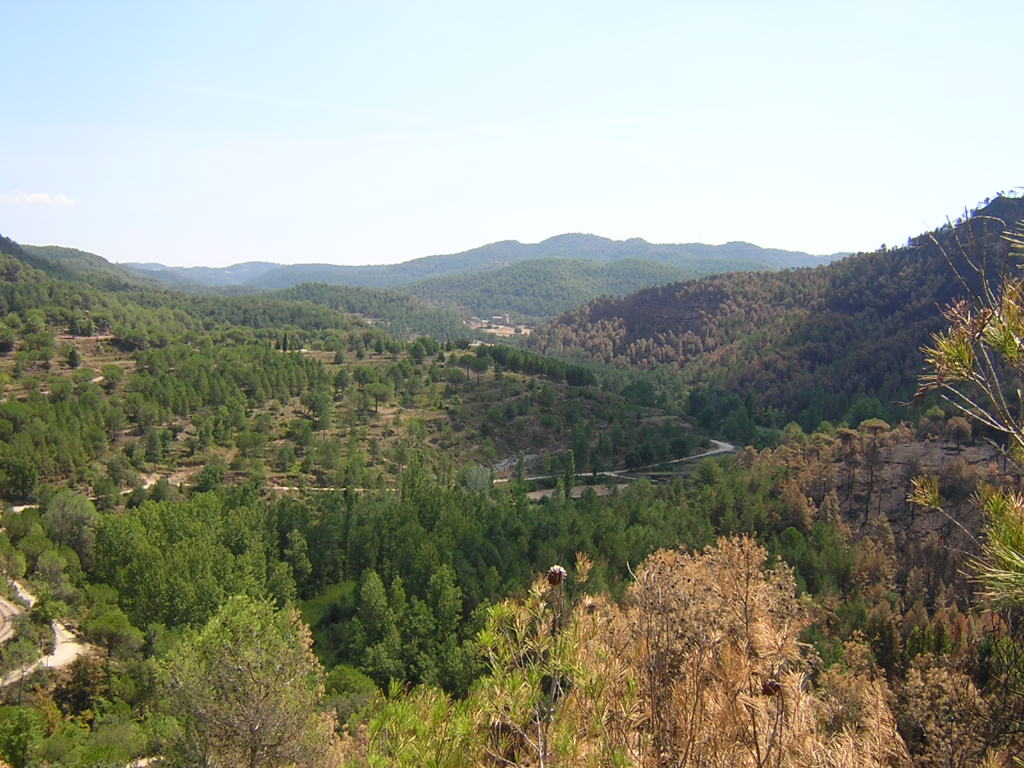 La Riera de Sant Joan (Monistrol de Calders, Moianès)